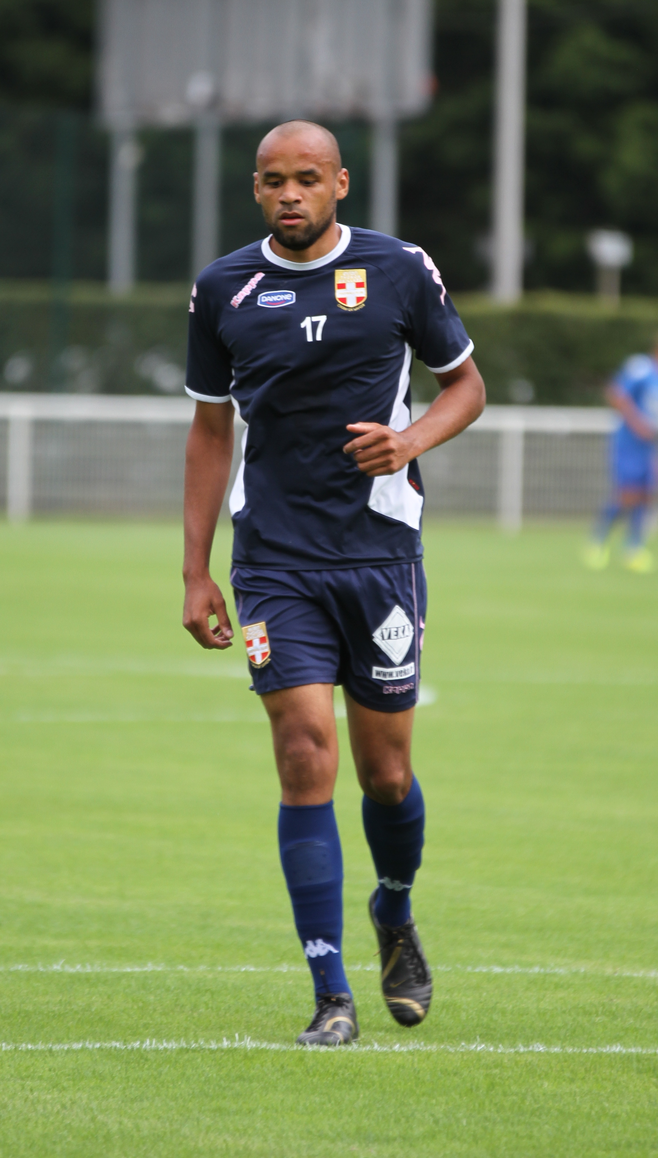 Aldo Angoula lors du match SC Bastia-eTG le samedi 12 juillet 2011